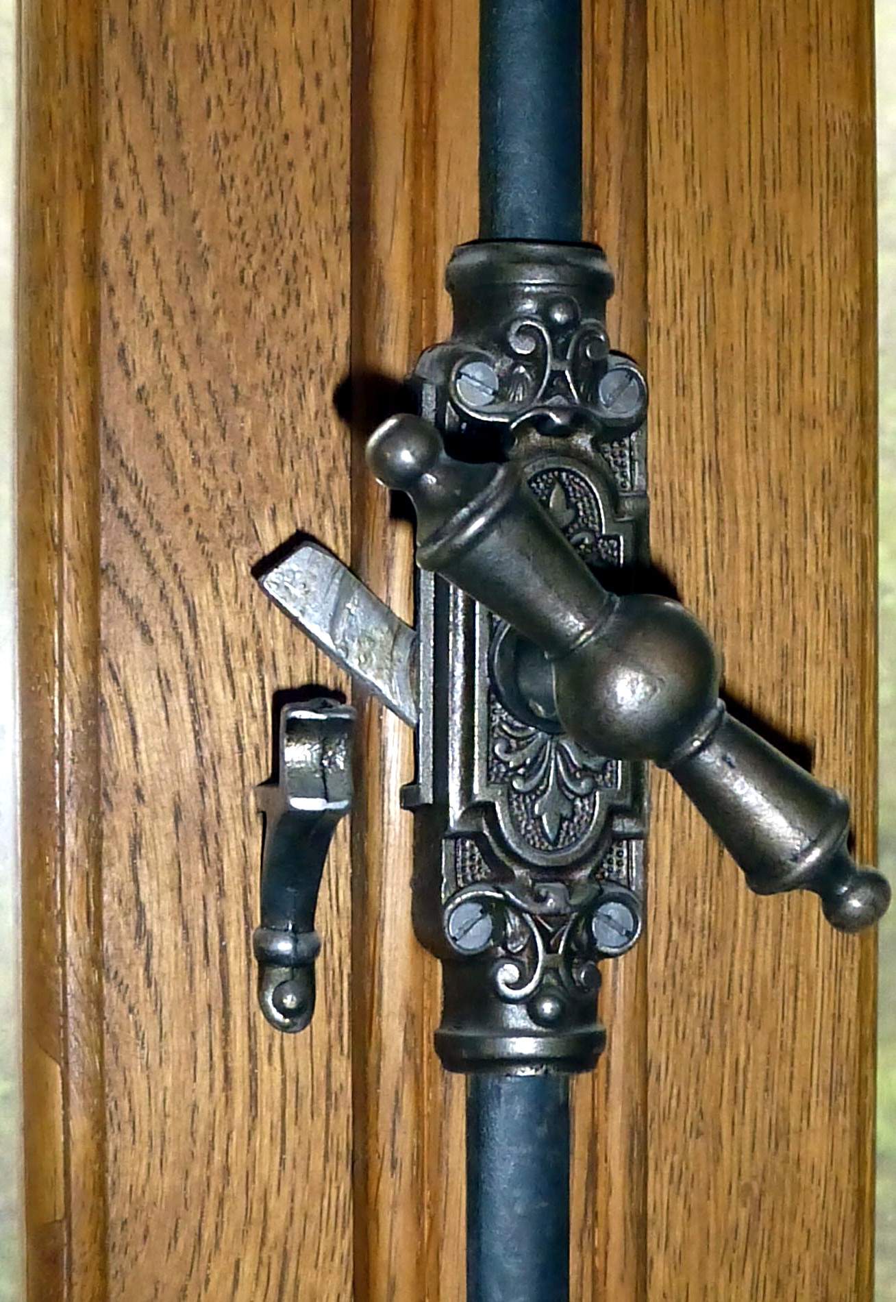 Festsaal der Köln-Rottweiler Pulverfabrik; Bascule-Griff im Festsaal der Köln-Rottweiler Pulverfabrik